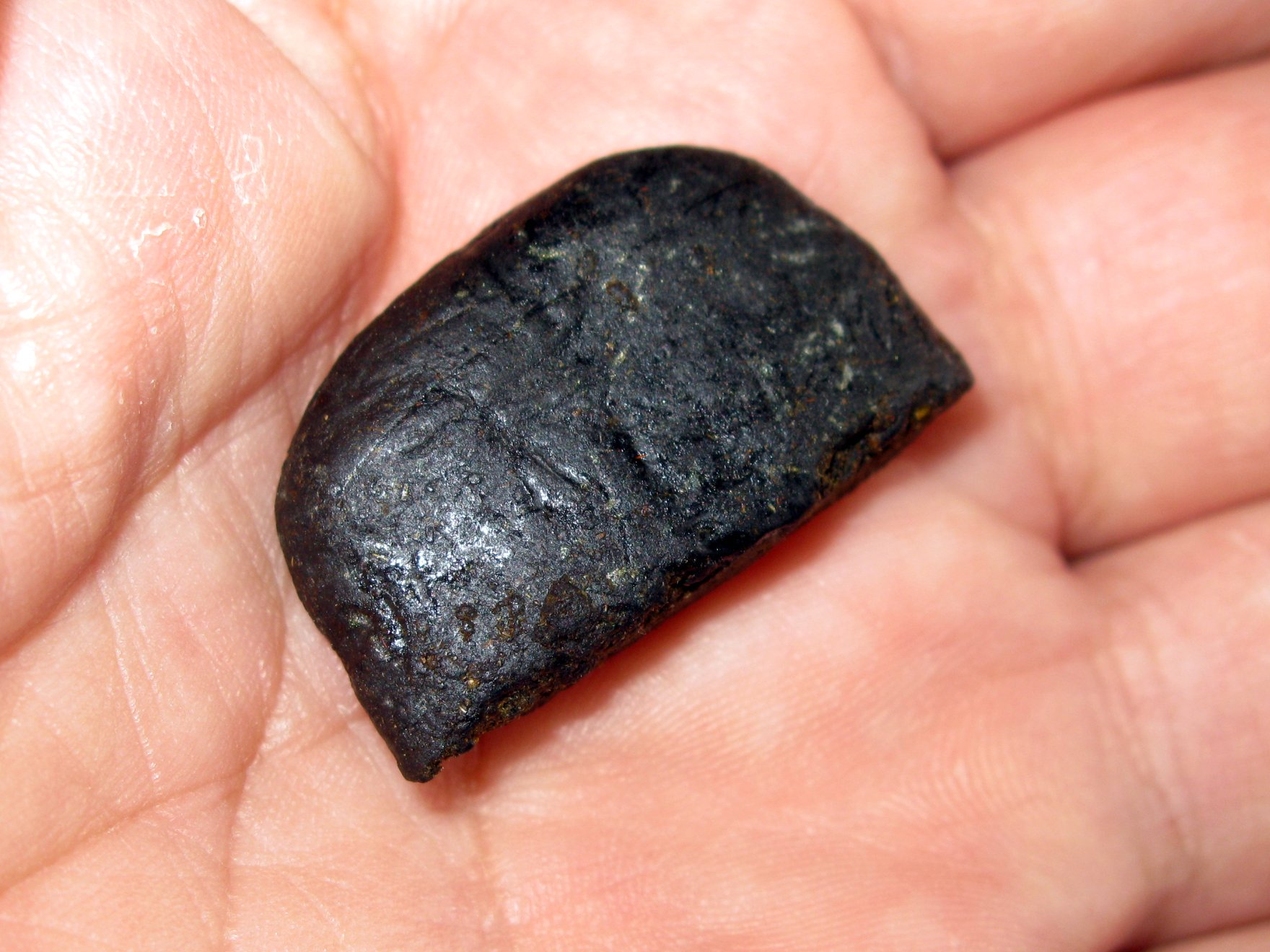 Pure Manali stuff (1 tolla = 10 g).